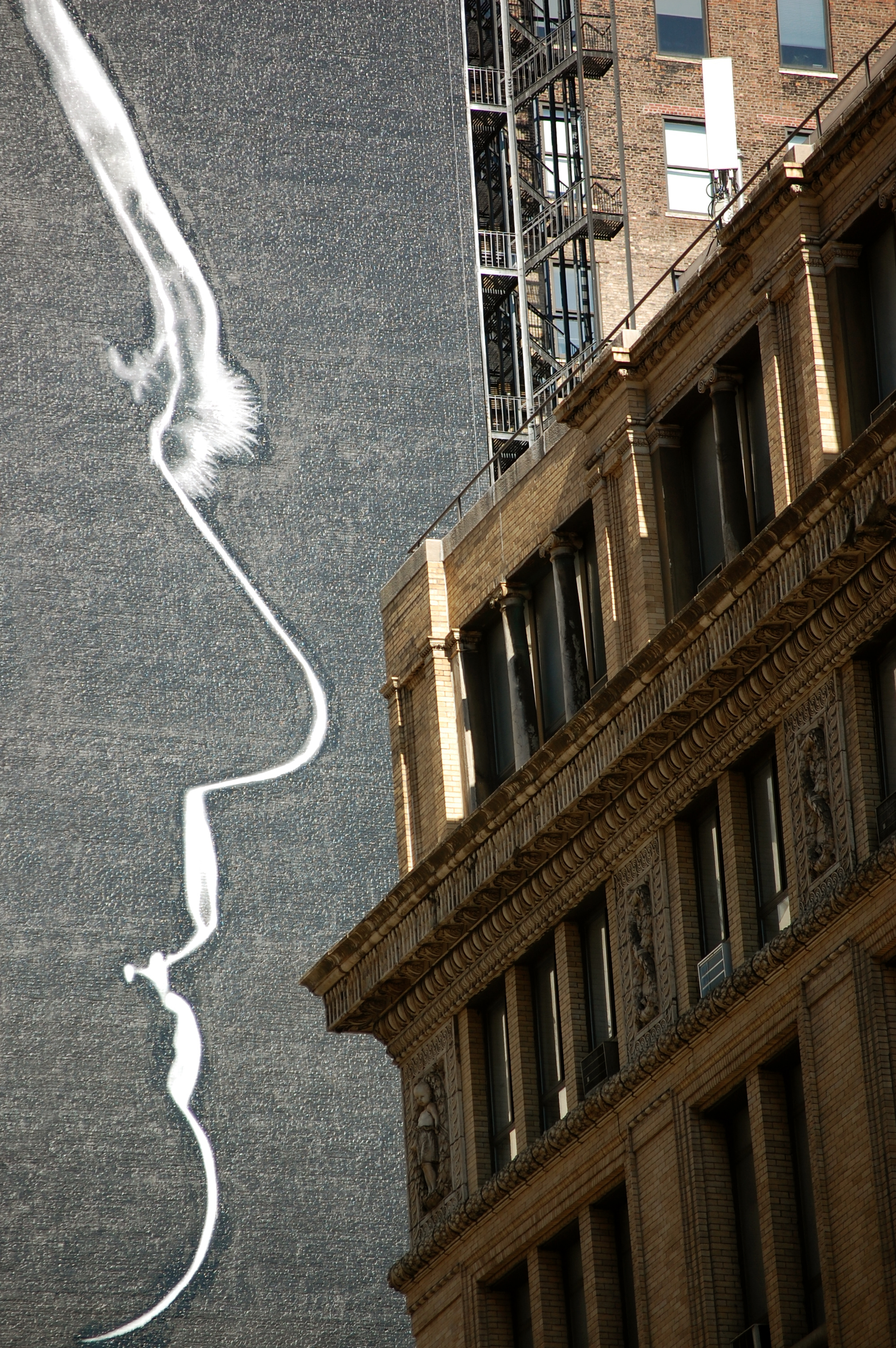 Façade d'un bâtiment sur lequel est dessinée la silhouette de Clint Eastwood (Etats-Unis)